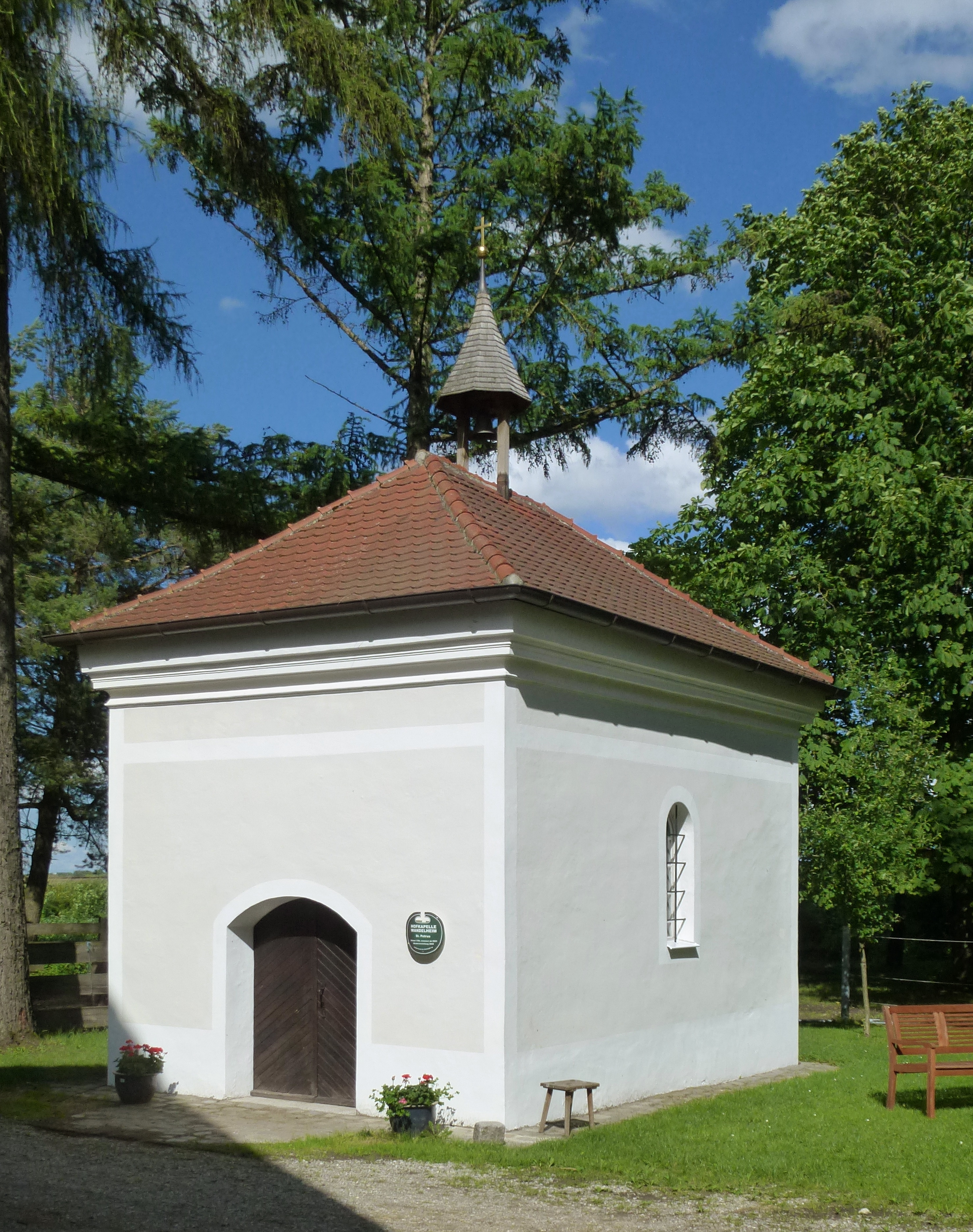 Germering - Ortsteil Wandelheim, Wandelheim 1, Hofkapelle St. Petrus in kubischer Form aus dem Jahr 1706. Aufnahme aus Westen